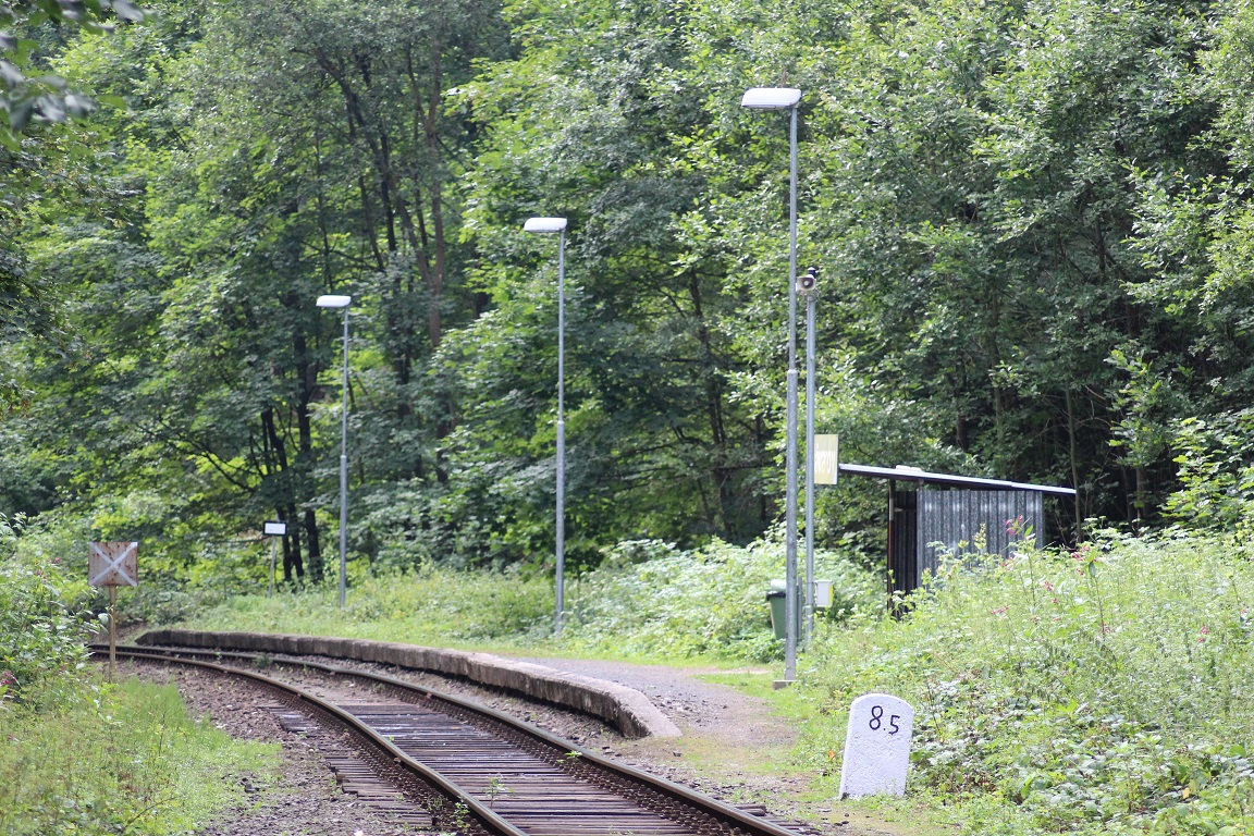 Železniční zastávka Návarov